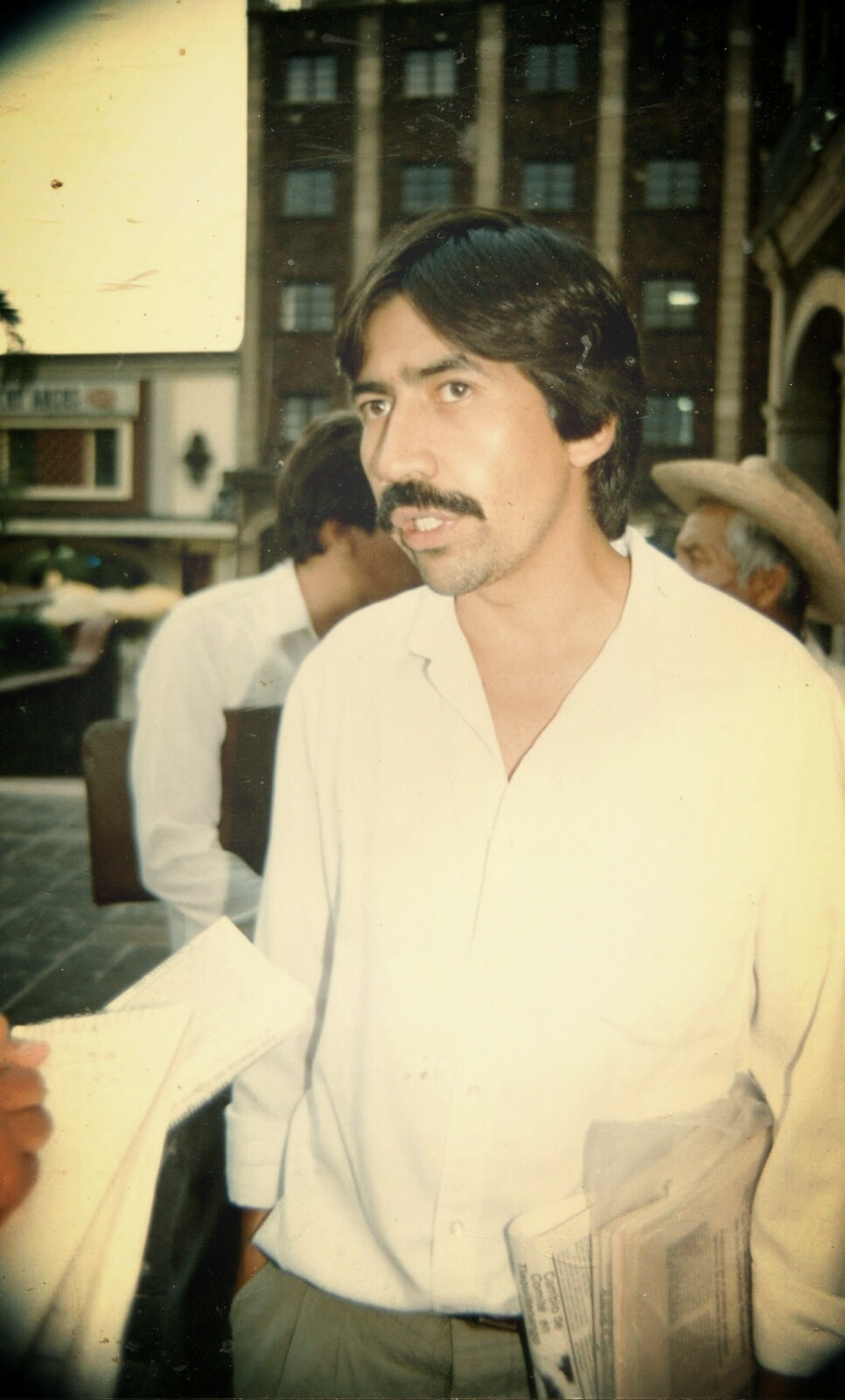 Ignacio Suárez Político Mexicano